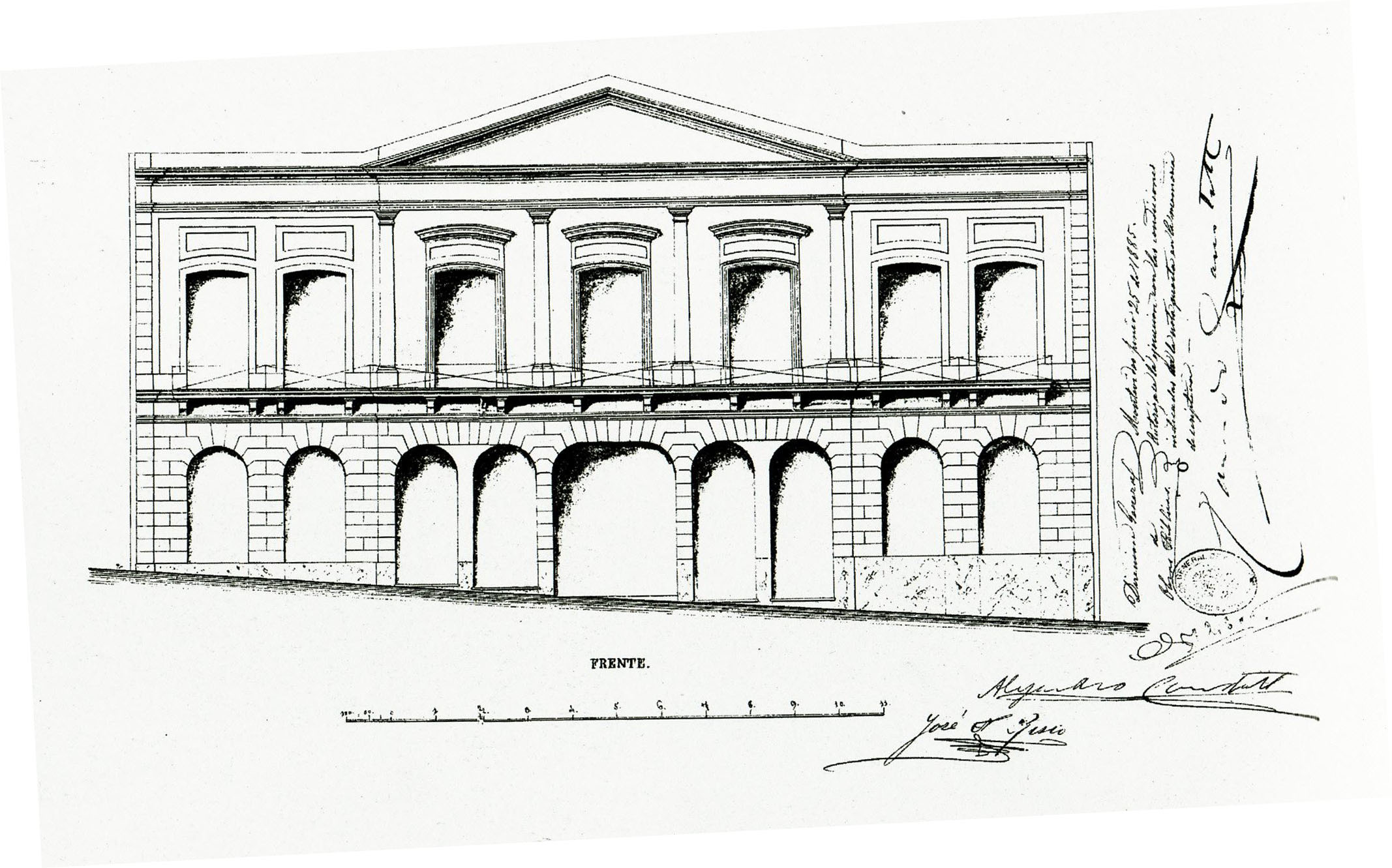 Plano original del edificio de Risso, calle Cuareim.